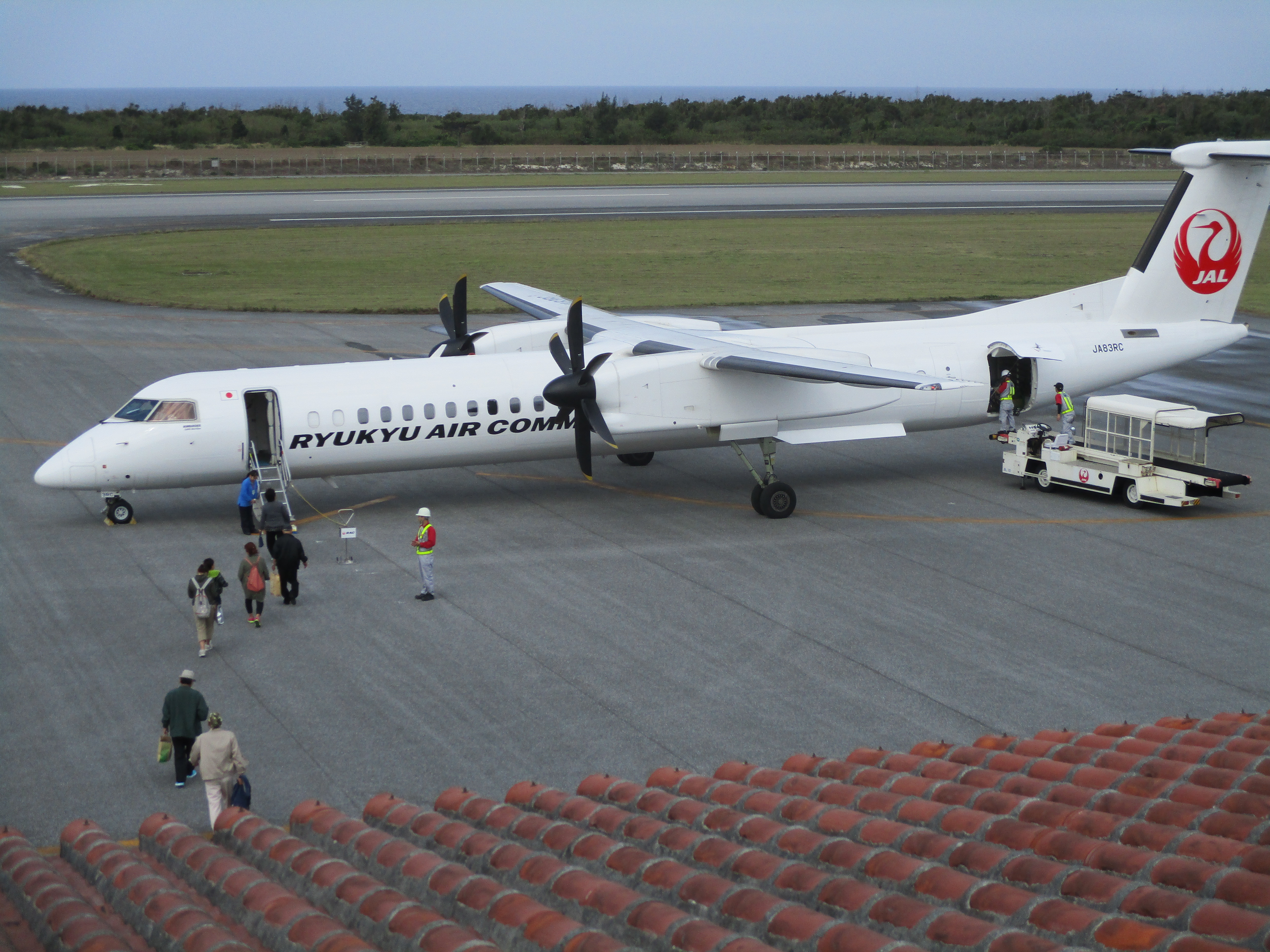 多良間空港で、乗客が搭乗中のボンバルディアDHC8-Q400CC機